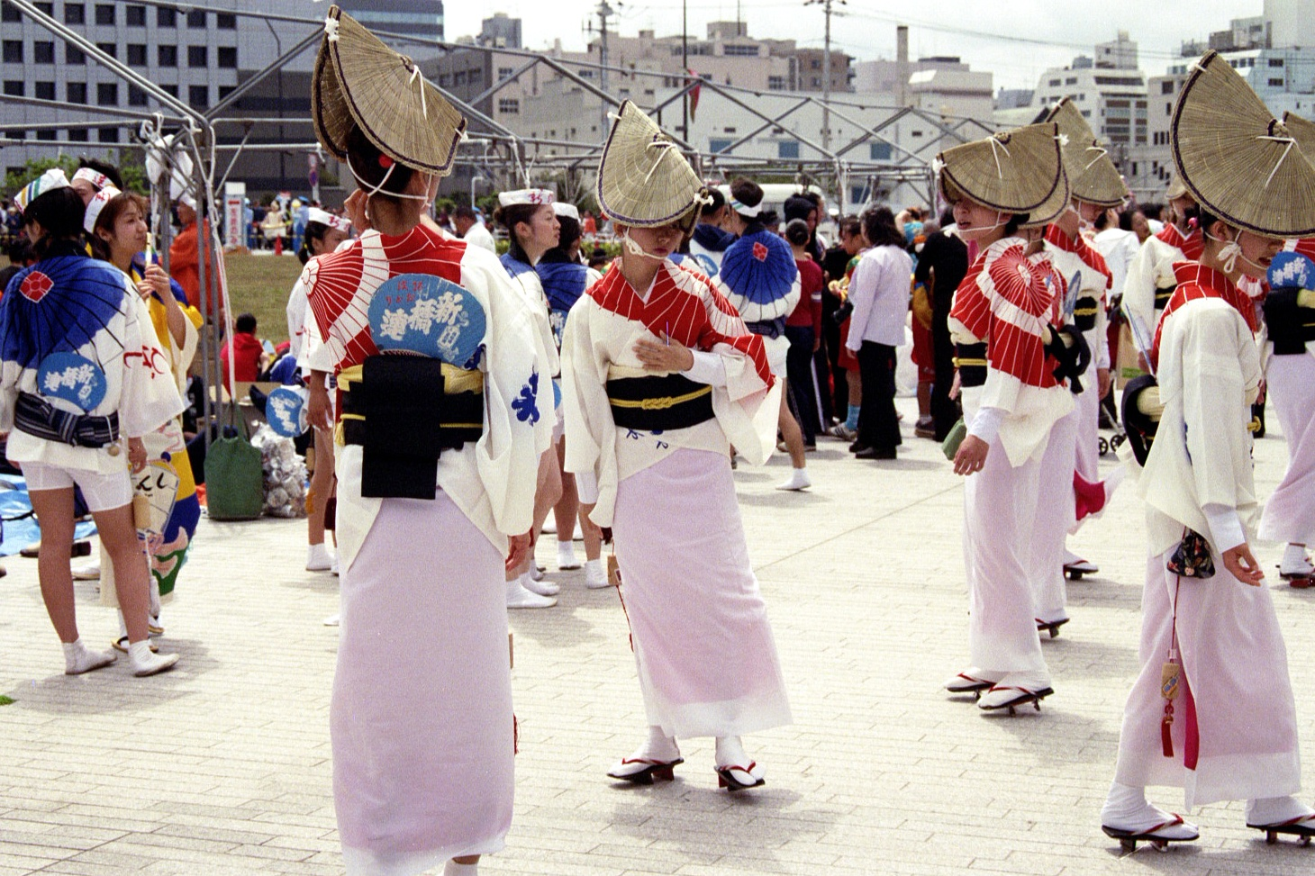 Awa-Odori(female dance)